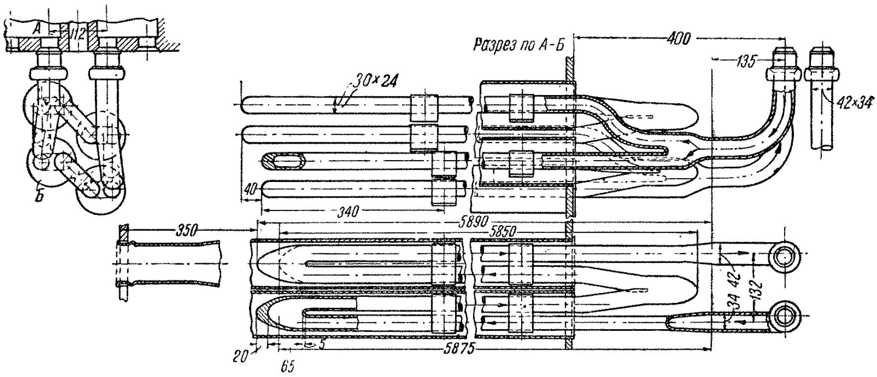 Пароперегреватель Элеско-Е (устанавливался на паровозах ФД и ИС)